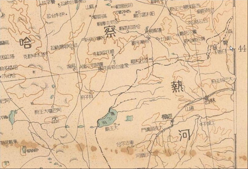 내몽고자치구 적봉시 임서현(内蒙古自治区赤峰市林西县) 북쪽 50Km지점에 있는 백탑자(白塔子)에 있는 고려성 위치도